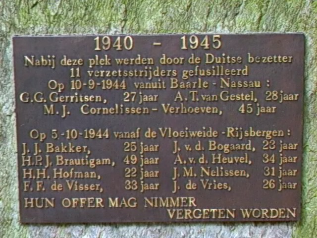 Detail van de plaquette van het oorlogsmonument aan de Galderseweg, Breda. Gelegen nabij de wijk het Ginneken